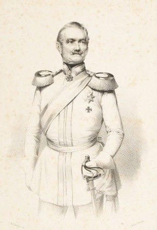 Feldmarschal Wrangel